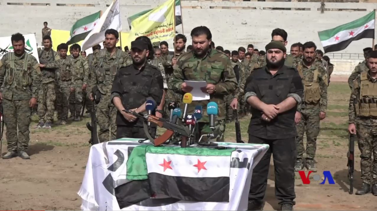 Combattants des groupes Jaych al-Thuwar et Liwa Chamal al-Democrati, affiliés aux Forces démocratiques syriennes (FDS), au stade de Raqqa, le 6 mars 2018. Abou Omar al-Idlebi, un commandant des FDS annonce alors le déploiement de 1700 combattants des FDS à Afrine contre la Turquie. 1 2 3